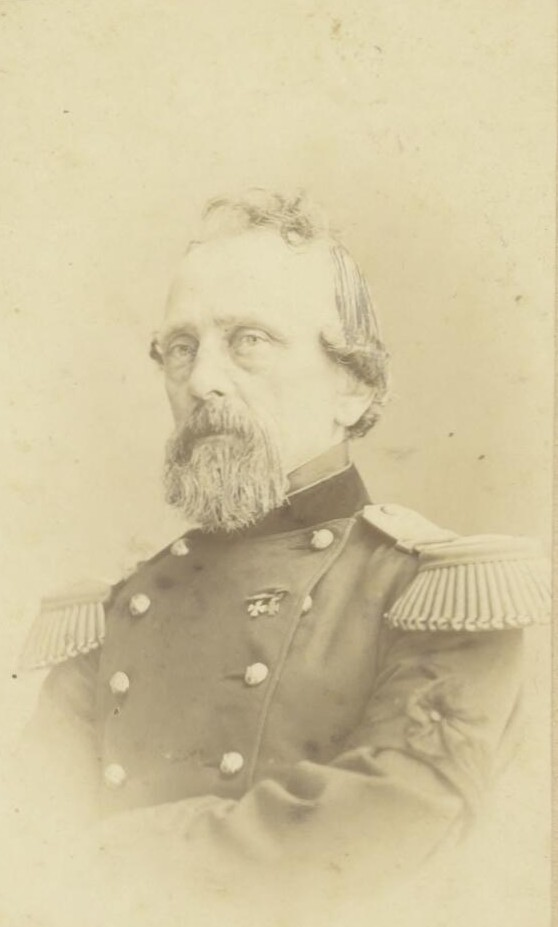 Portret van Hugo van der Meer de Walcheren (1810-1896)